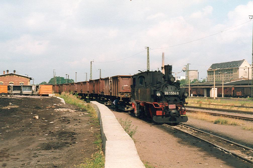 im Bahnhof Oschatz bereit stehender Güterzug